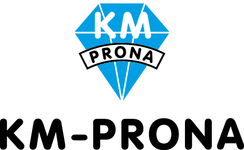 Logo